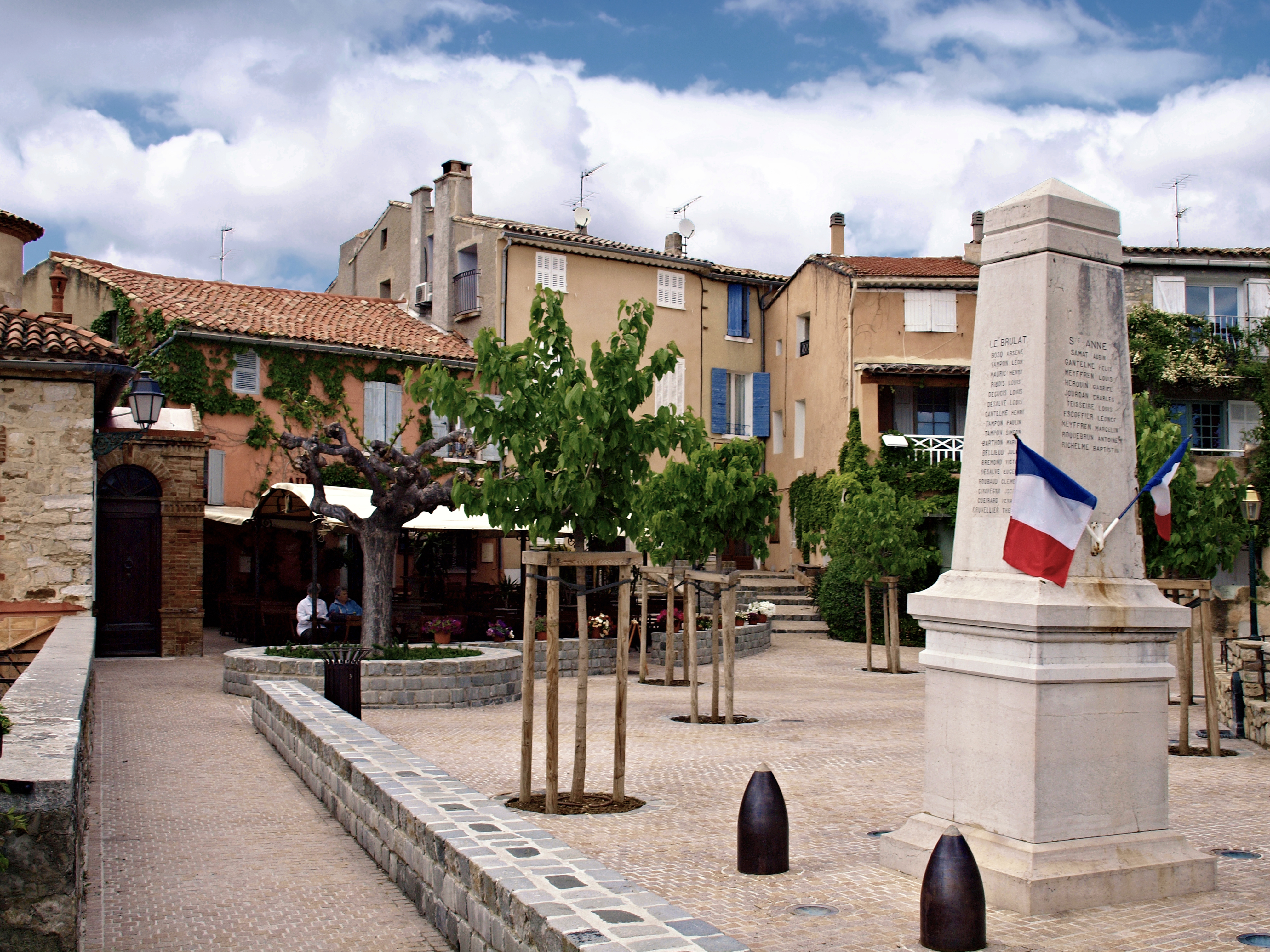 Le Castellet (Var - France) - Monument aux morts